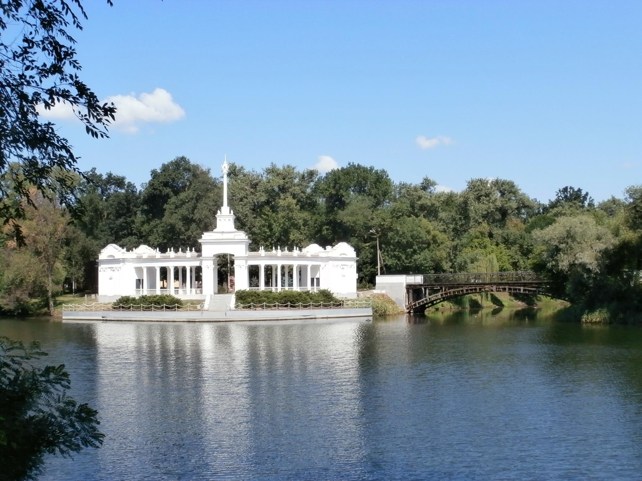 Mündung der Saksahan (rechts oben) in die Ingulez (unten im Bild)